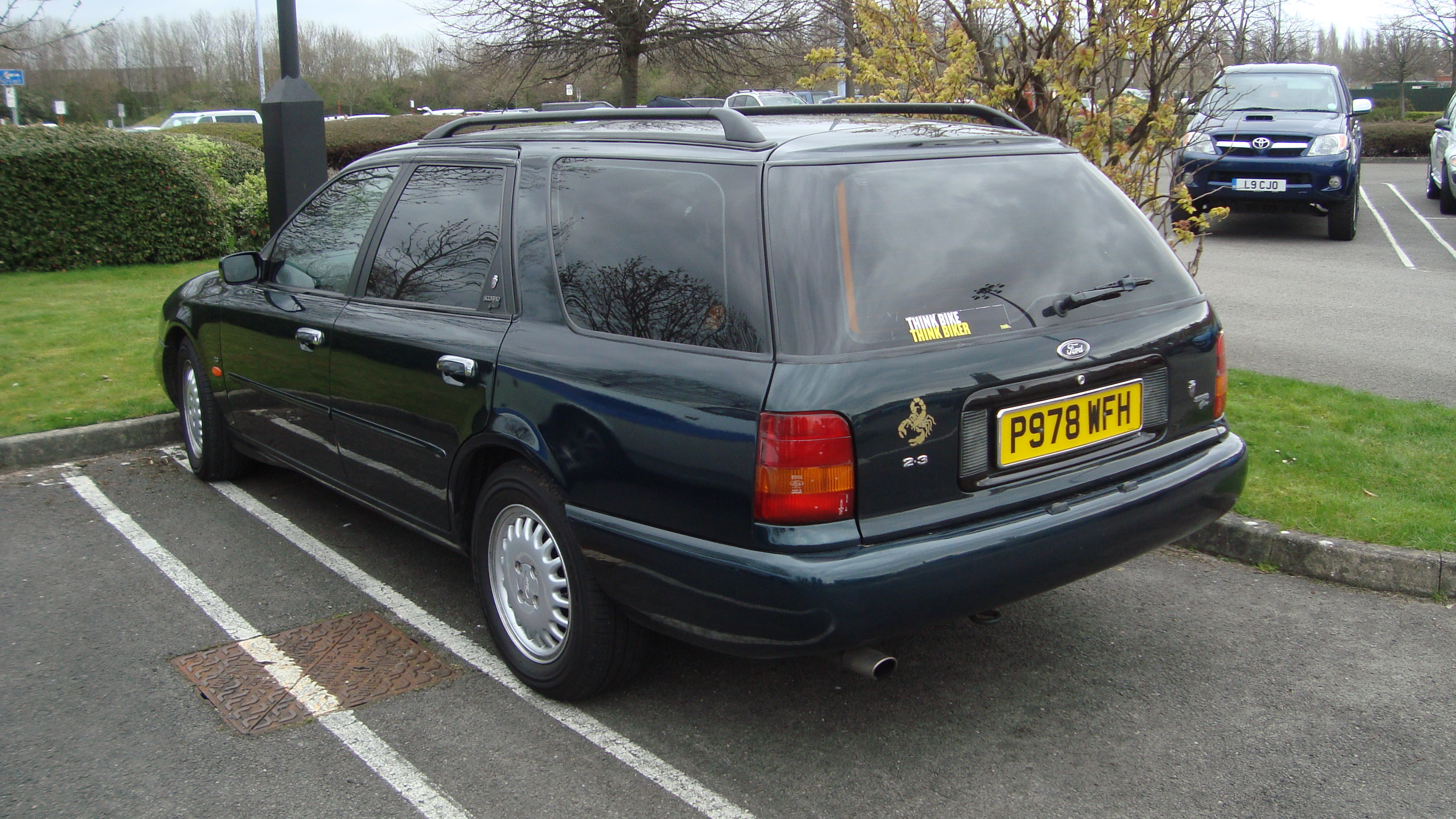 1997 Ford Scorpio 2.3 Ghia Estate